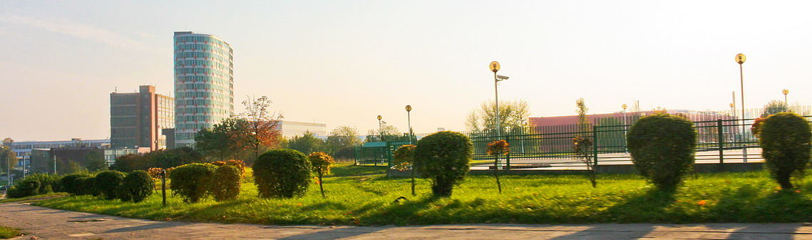 New Žirmūnai